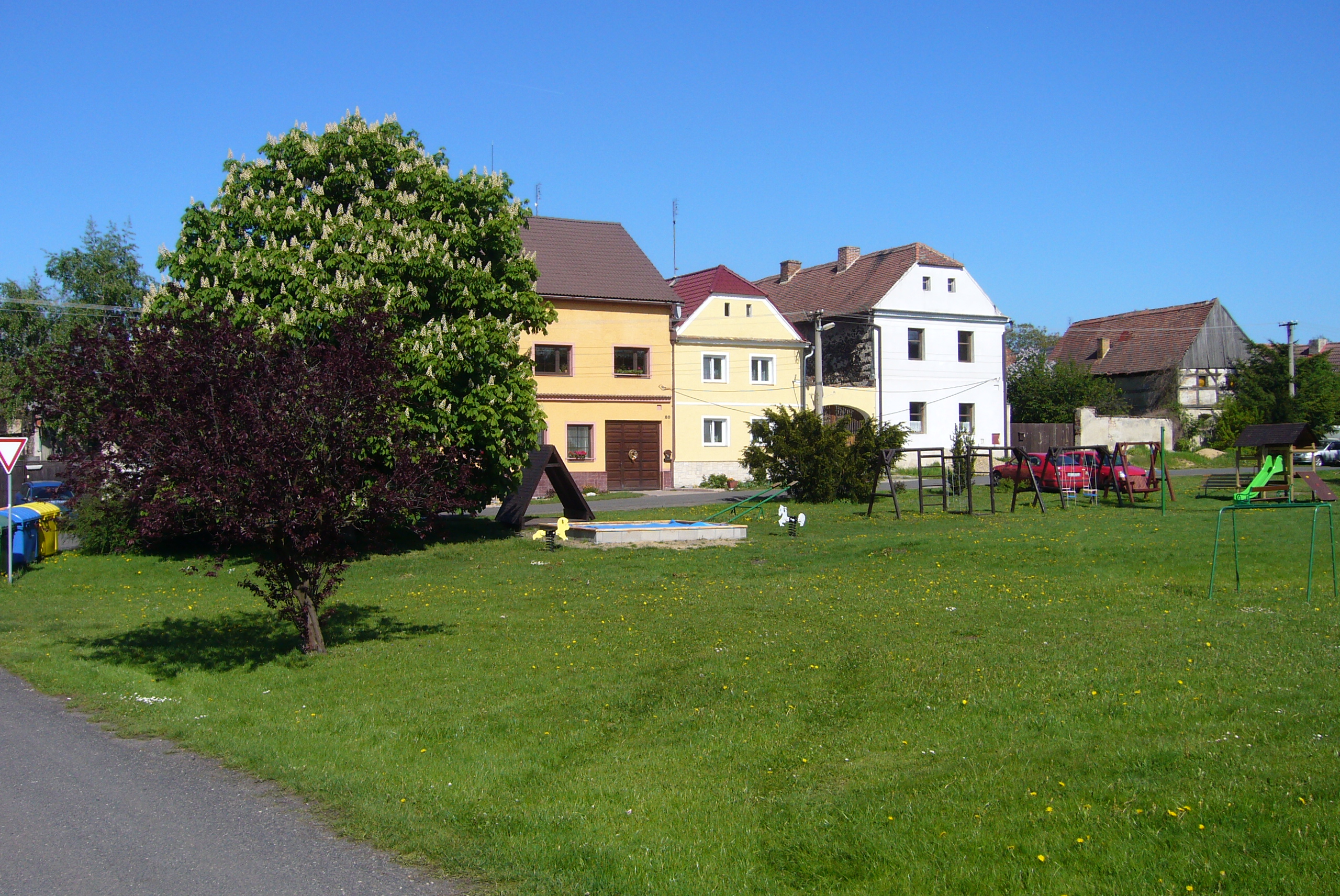 Žichov - severovýchodní část návsi